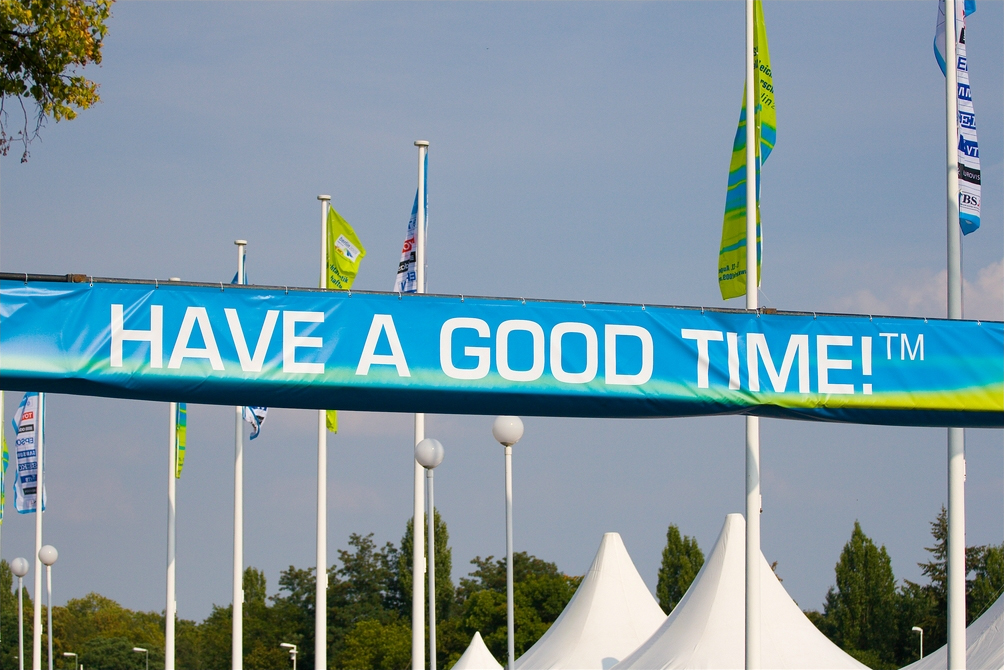 Have a good Time!!!